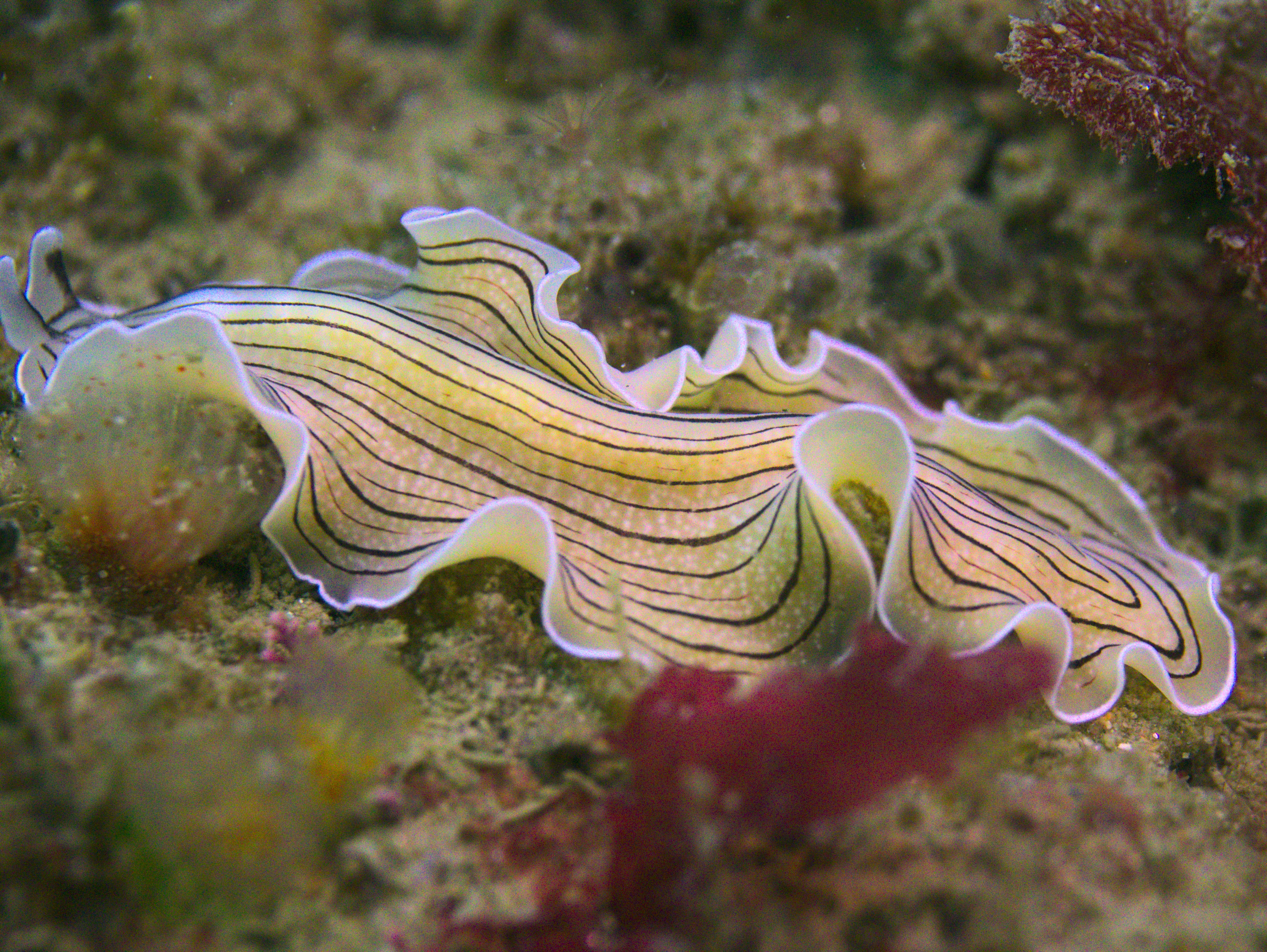 Photographie sous marine d'un Prostheceraeus vittatus ou Planaire blanche